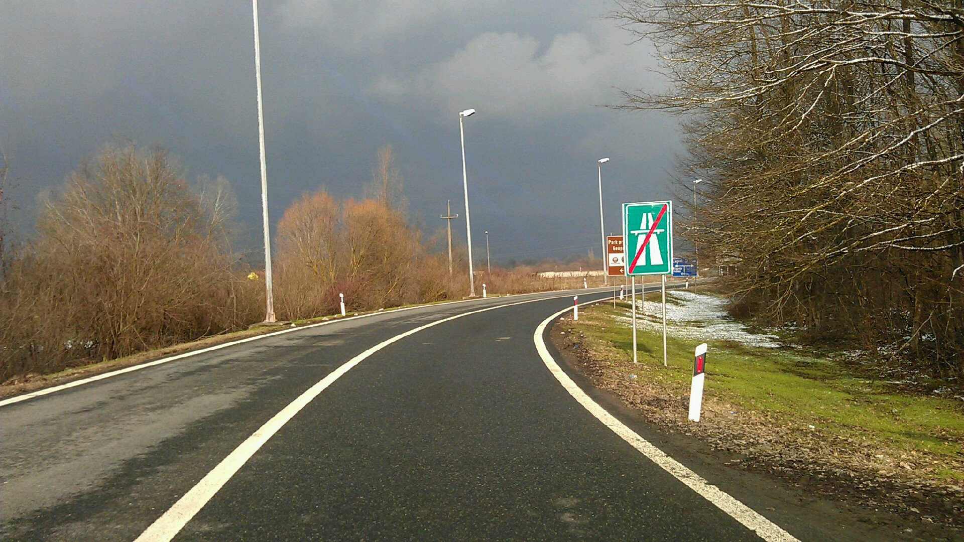 lužani